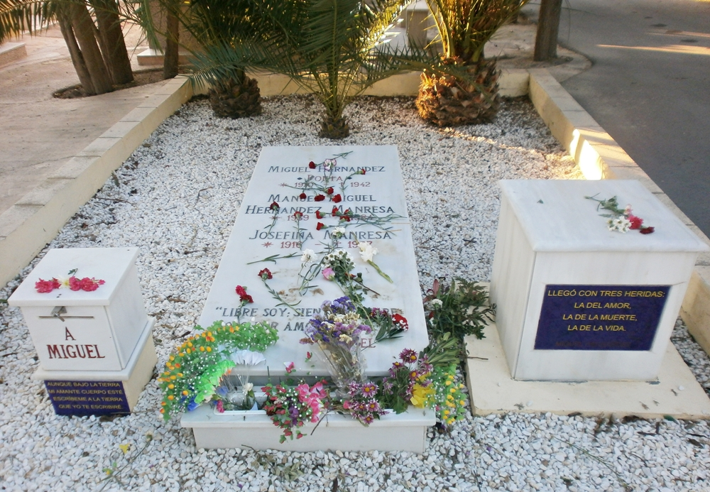 Tumba del poeta Miguel Hernández en el cementerio de Alicante, España.